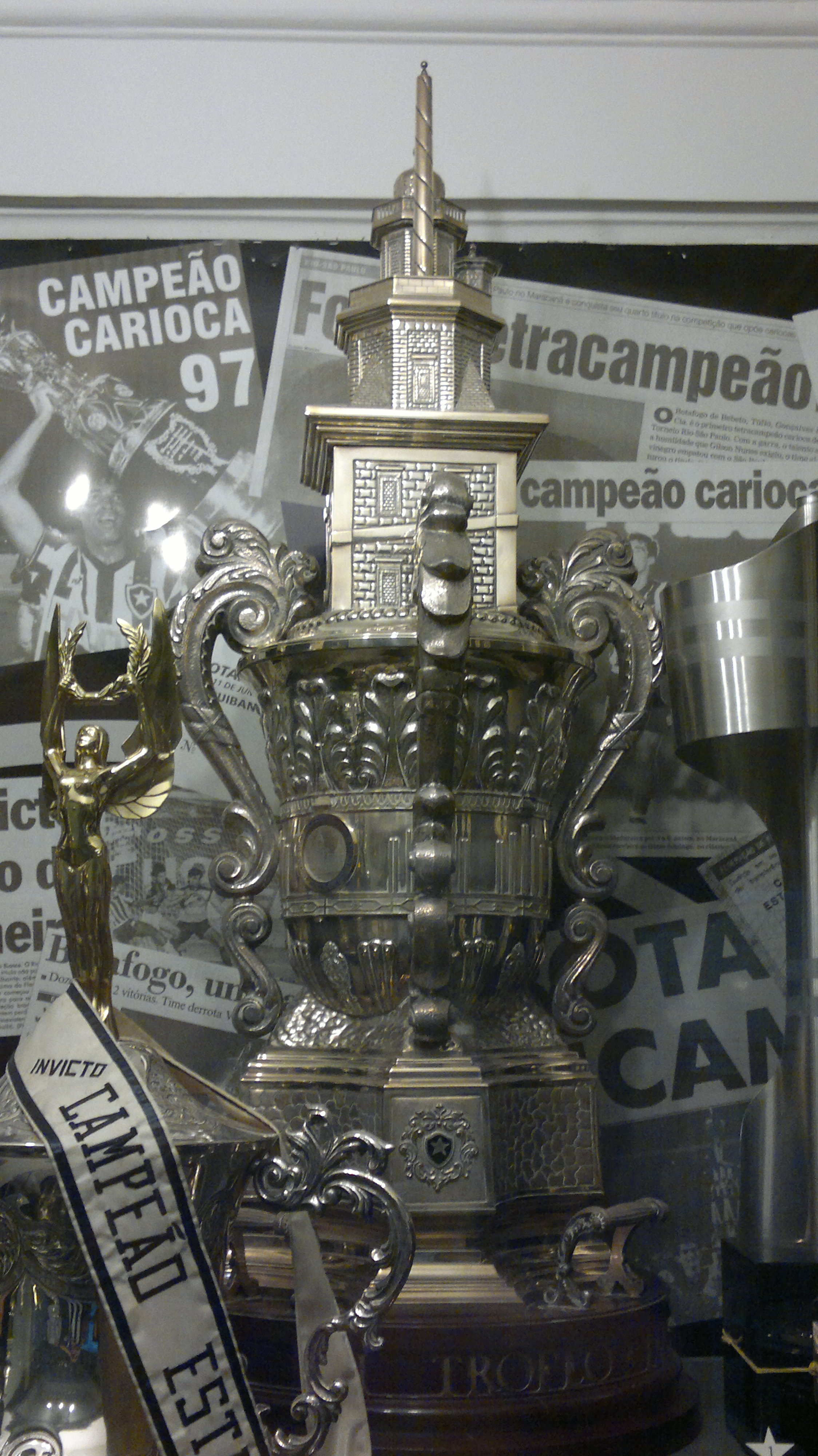 Taça Teresa Herrera de 1996.